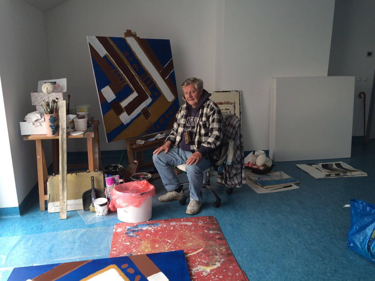 Robert Baća u svom ateljeu, 2016. godina